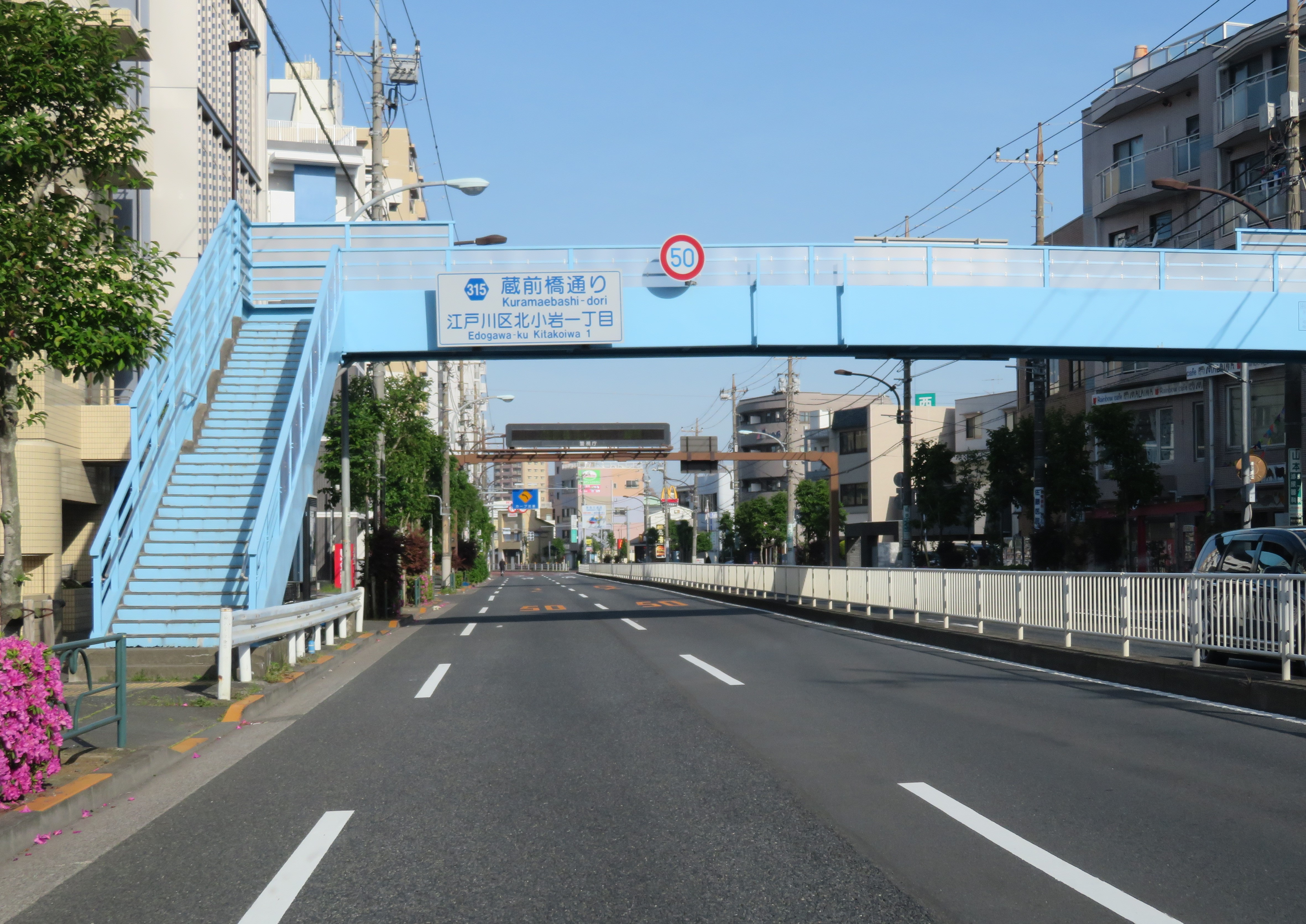 東京都道315号線（蔵前橋通り）江戸川区北小岩一丁目付近（蔵前橋方面を撮影） Canon PowerShot SX720 HS